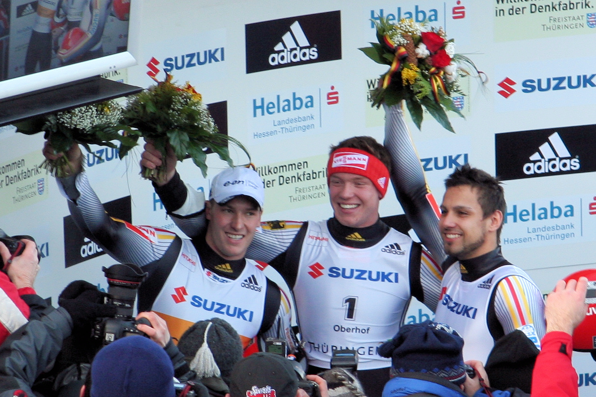 Die WM Sieger im Herren-Einzel 2008 David Möller (2. Platz), Felix Loch (Weltmeister) und Andi Langenhan (3. Platz)